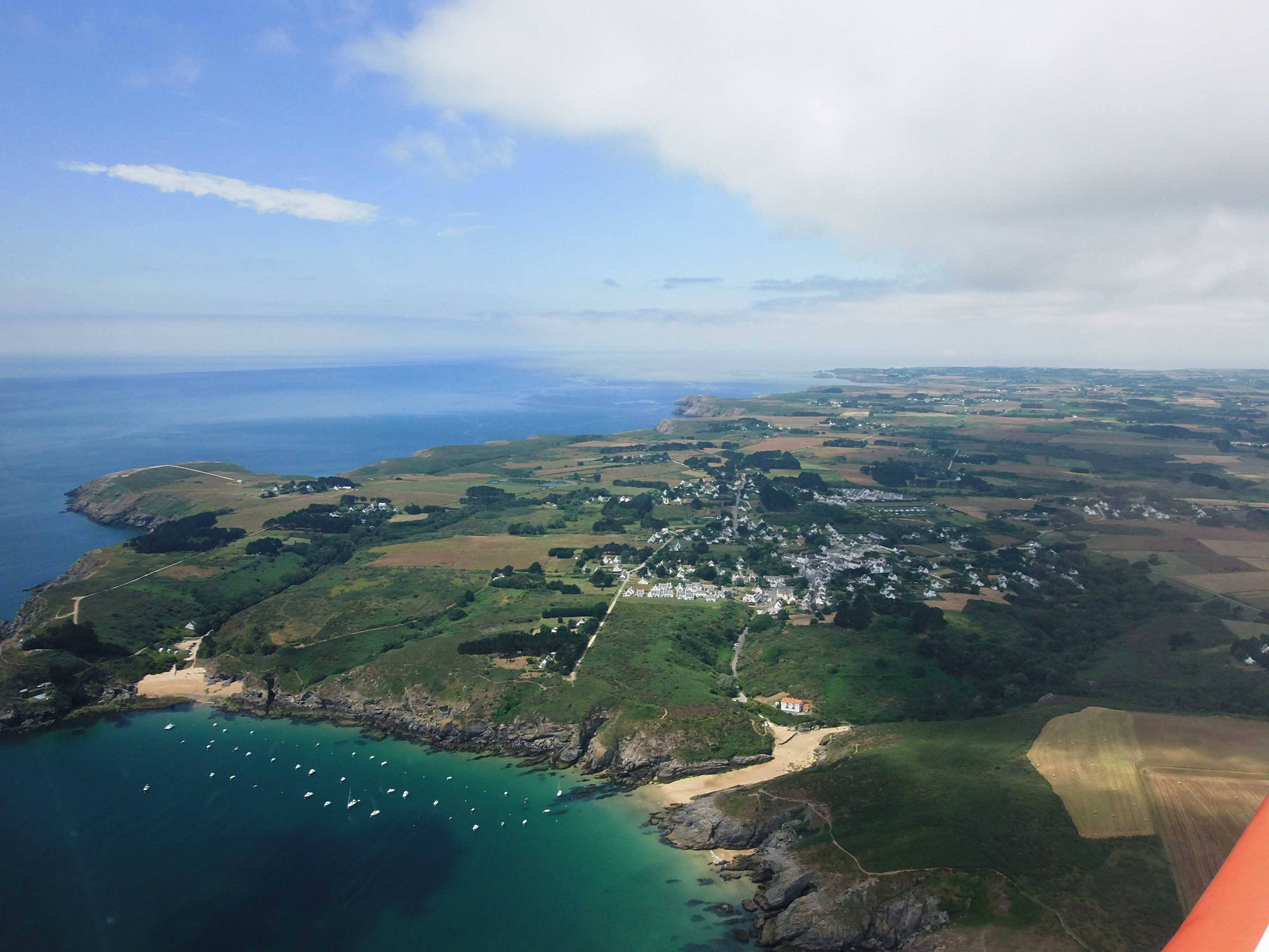 Côte sud de Locmaria (Morbihan, France), vue orientée de l'Est vers l'Ouest, vue d'avion, juillet 2014. La commune de Locmaria se trouve au sud de Belle-Île-en-Mer. Voir aussi autre cliché et en 2015.